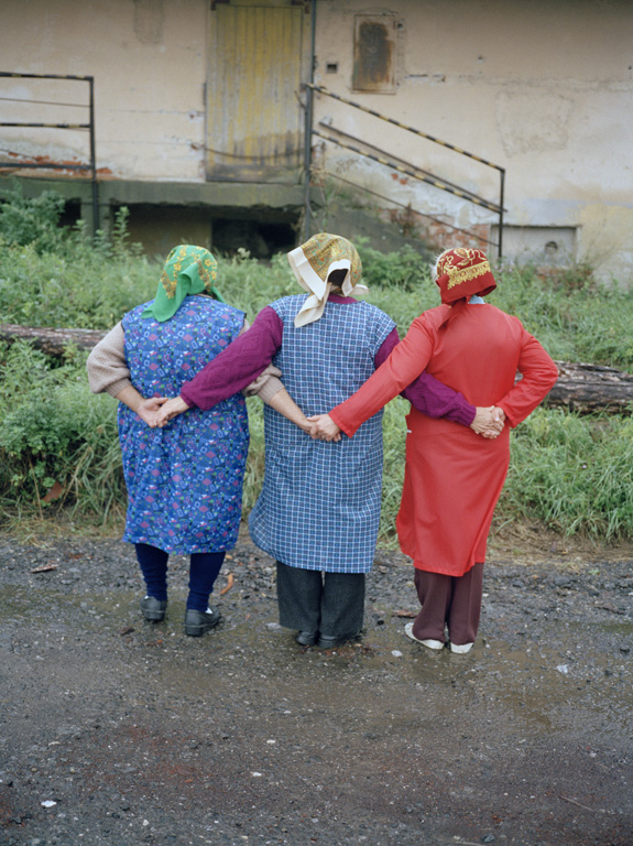 Fotografie z cyklu Unofficial, ve kterém popisovala život na Slovensku po pádu komunismu Fotografie z cyklu Unofficial, ve kterém popisovala život na Slovensku po pádu komunismu